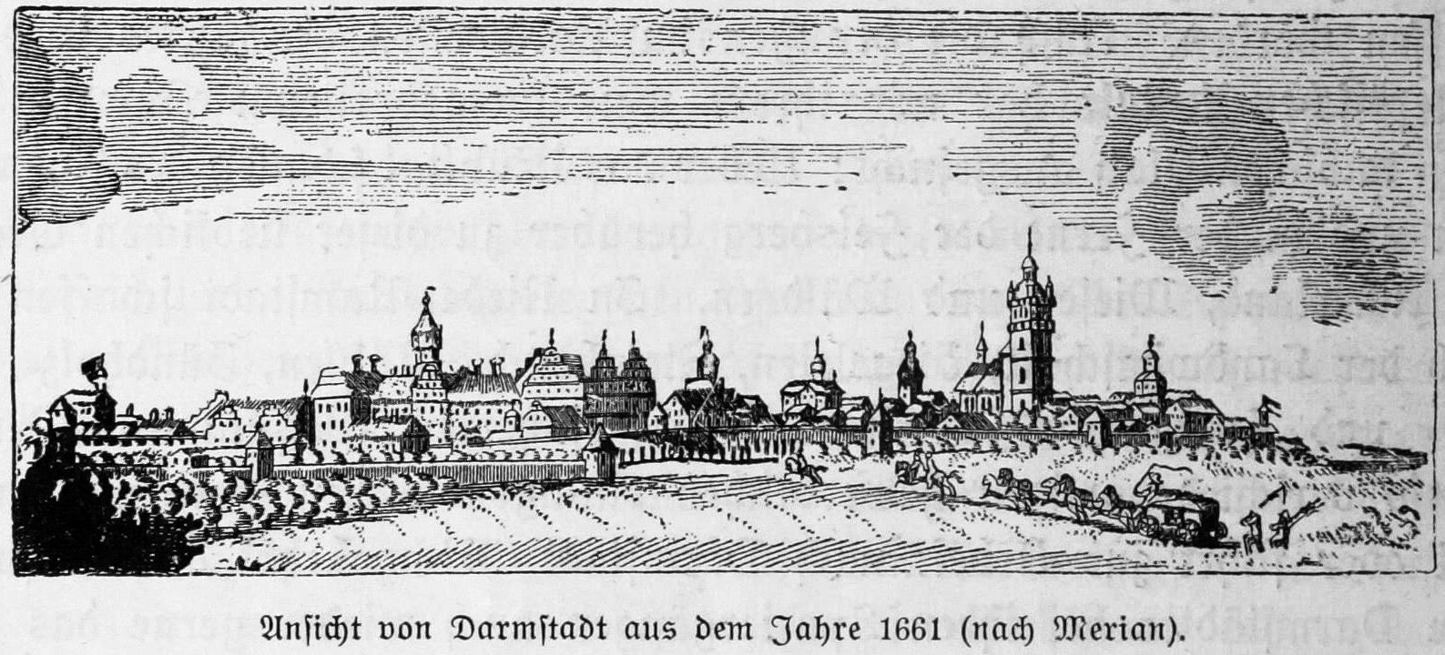 Ansicht von Darmstadt aus dem Jahre 1661 (nach Merian)